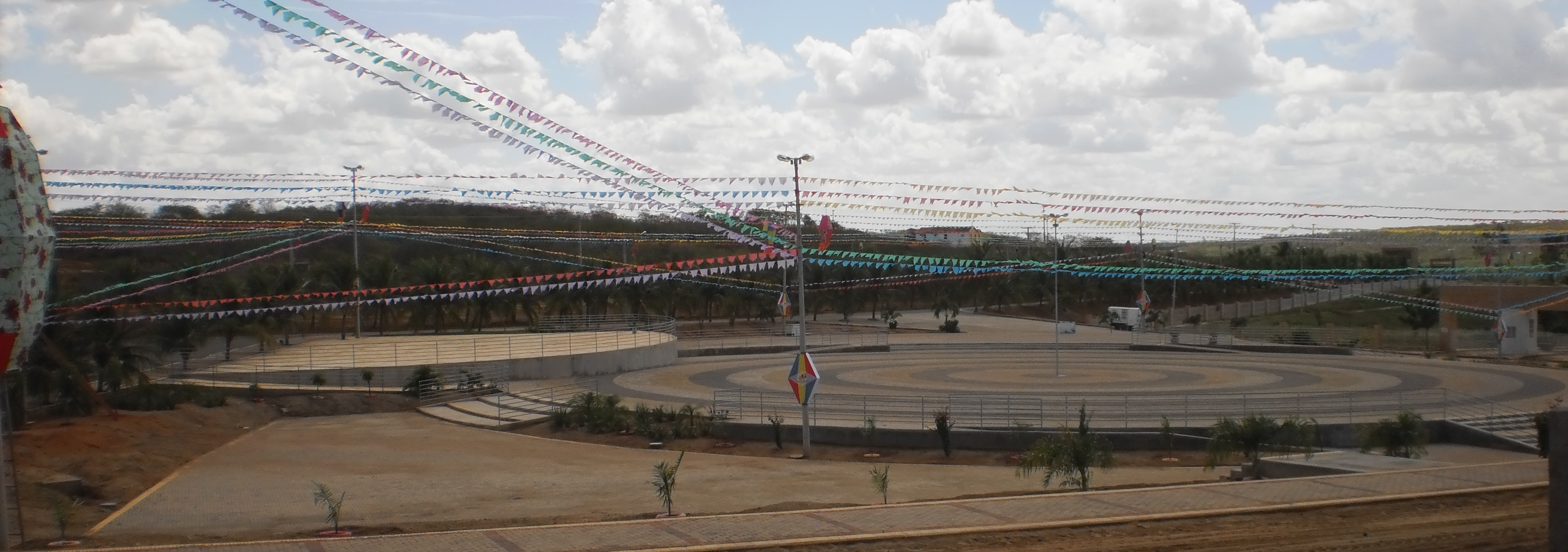 Praça de eventos de Riacho da Cruz enfeitada durante o período das festas juninas - Rio Grande do Norte, Brasil.